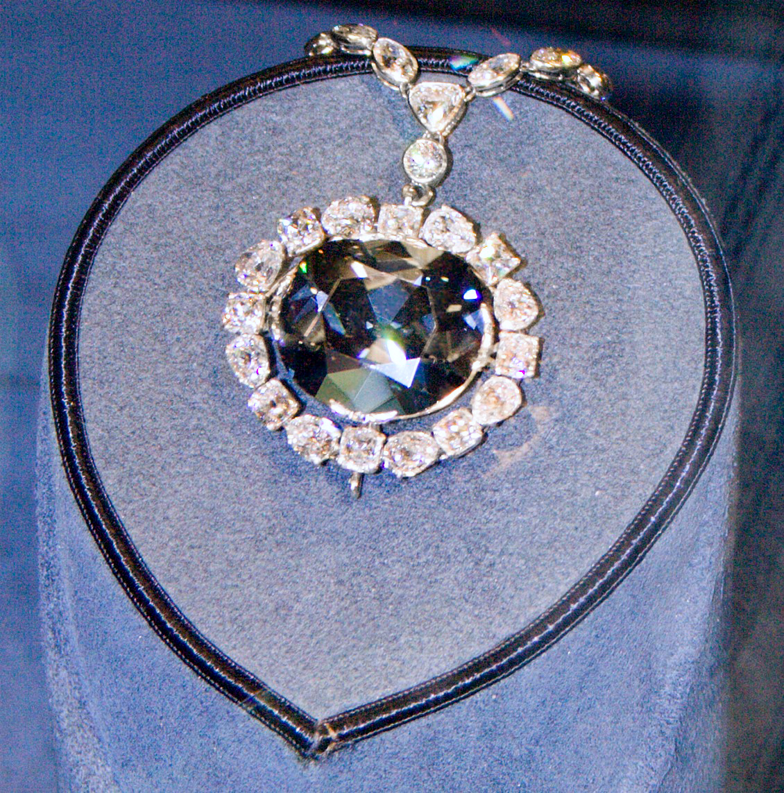 front view